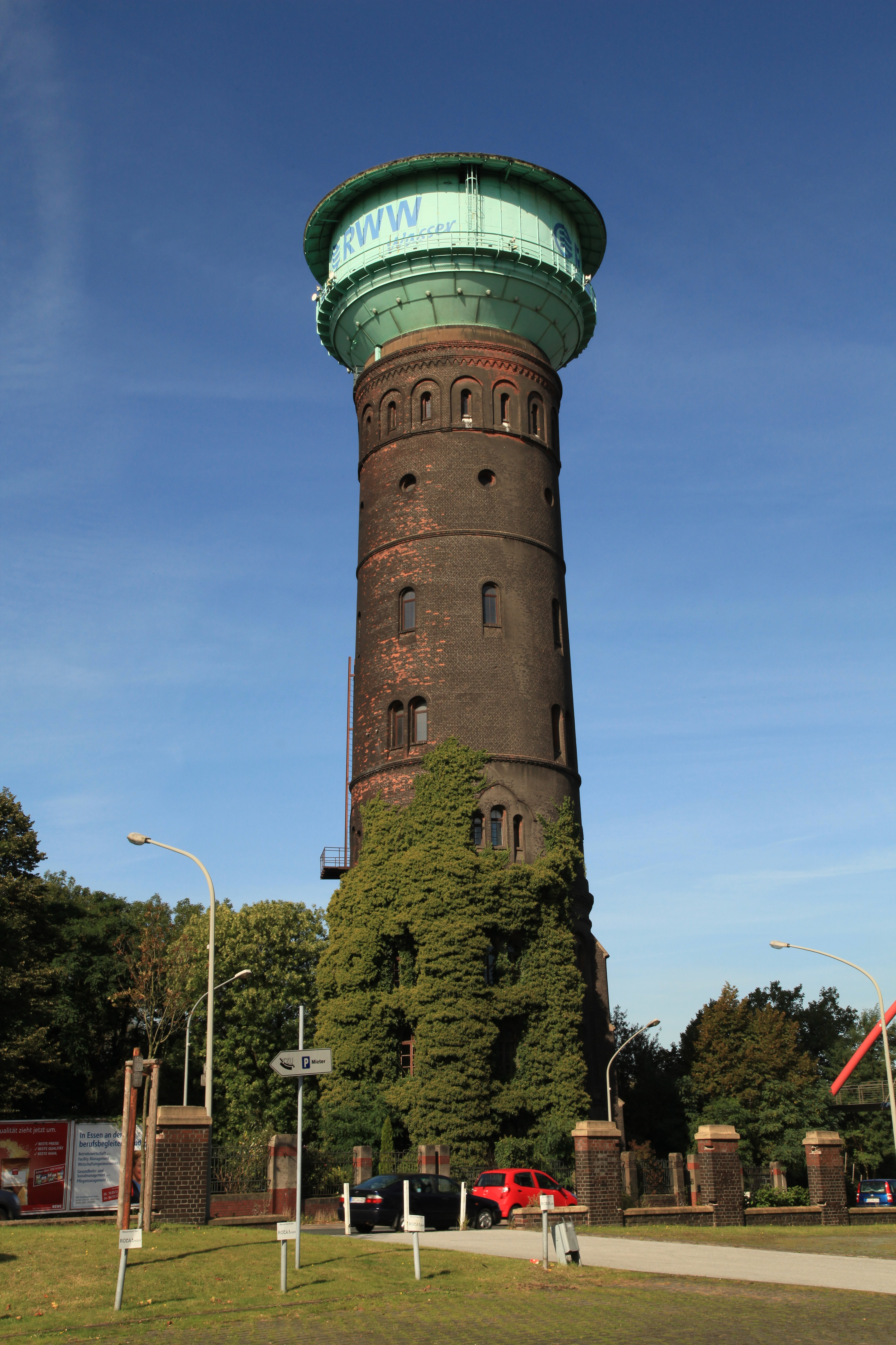 Ehemaliger Wasserturm der GHH, Mülheimer Straße 1 in Oberhausen